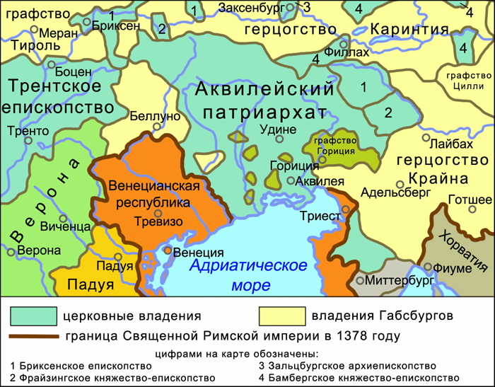 Карта Аквилейского патриархата (1378 год).